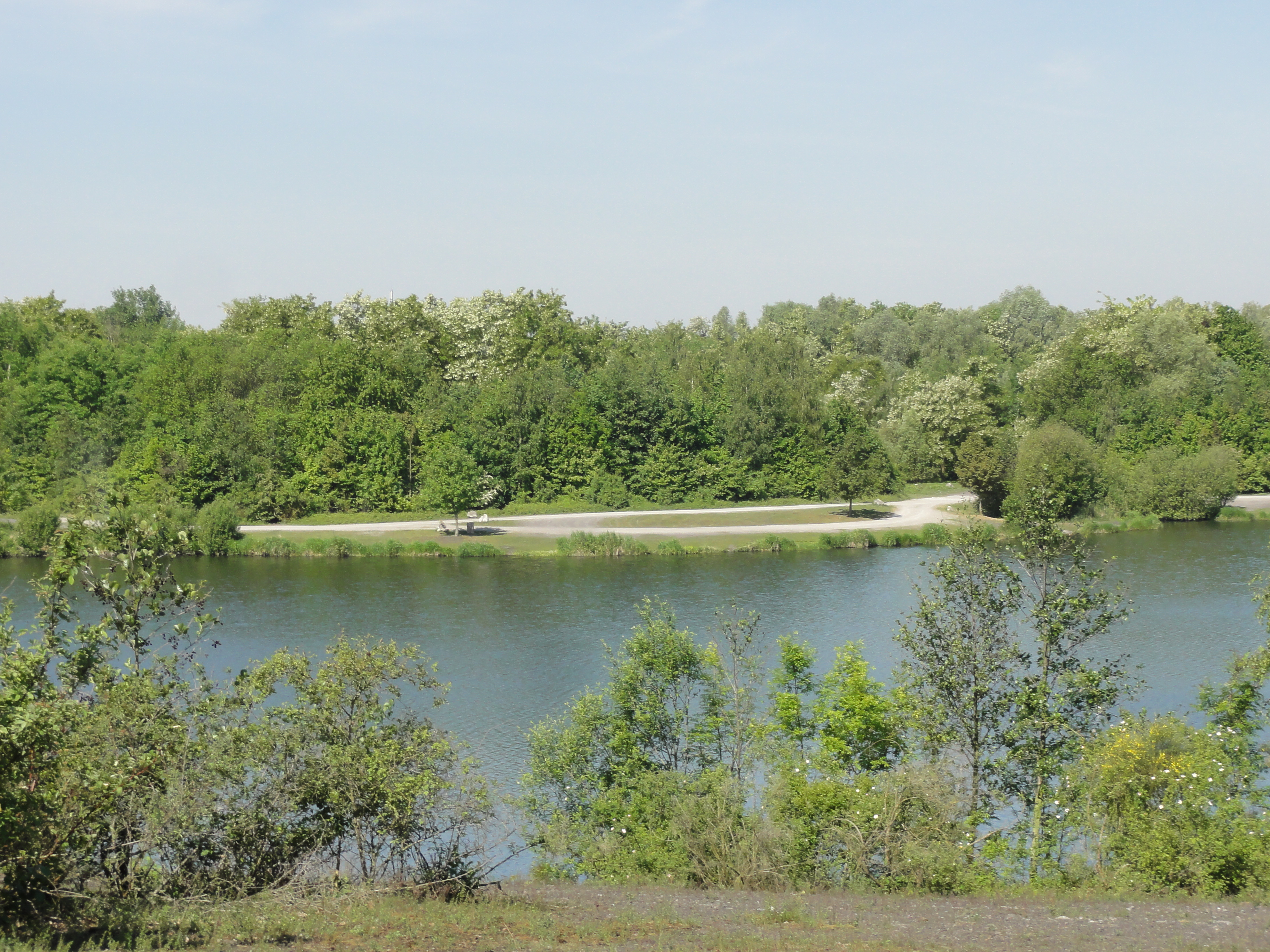 Terril n° 194 dit Acacias, Compagnie des mines d'Anzin, Condé-sur-l'Escaut, Nord, Nord-Pas-de-Calais, France.